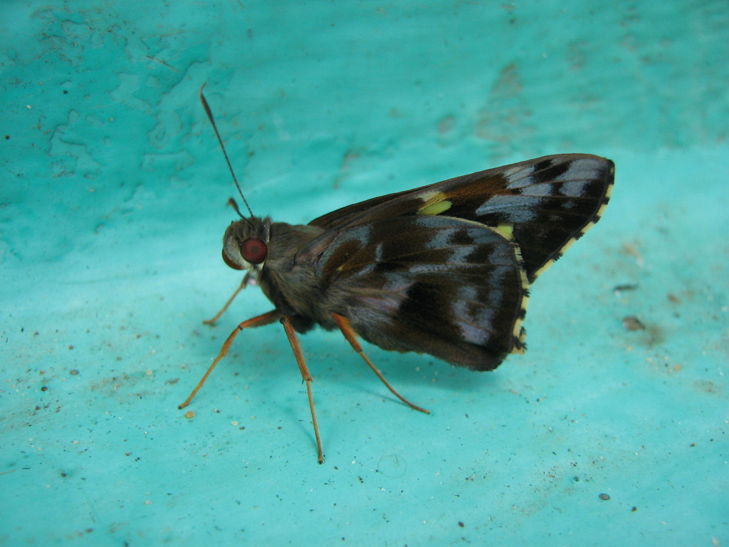 Papillon aux marais de Kaw